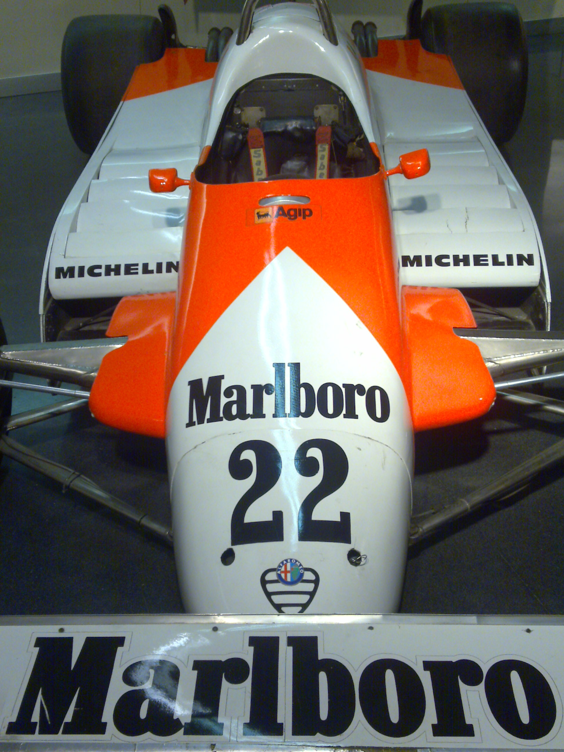 Alfa Romeo 179F